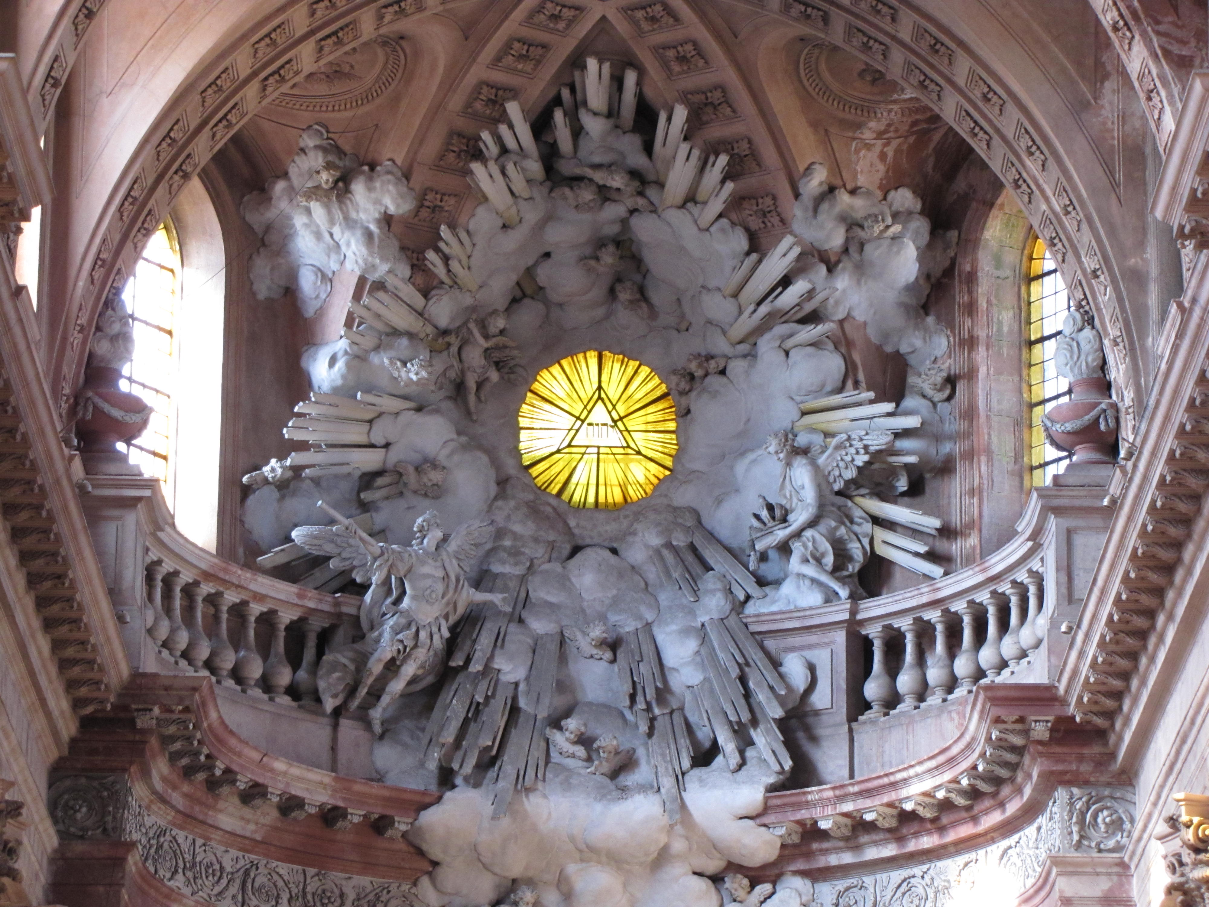 Alsace, Haut-Rhin, Église abbatiale Notre-Dame de Guebwiller (1768-1785), place Jeanne-d'Arc (PA00085438, IA00054832). Sculpture monumentale du chœur (XVIIIe).